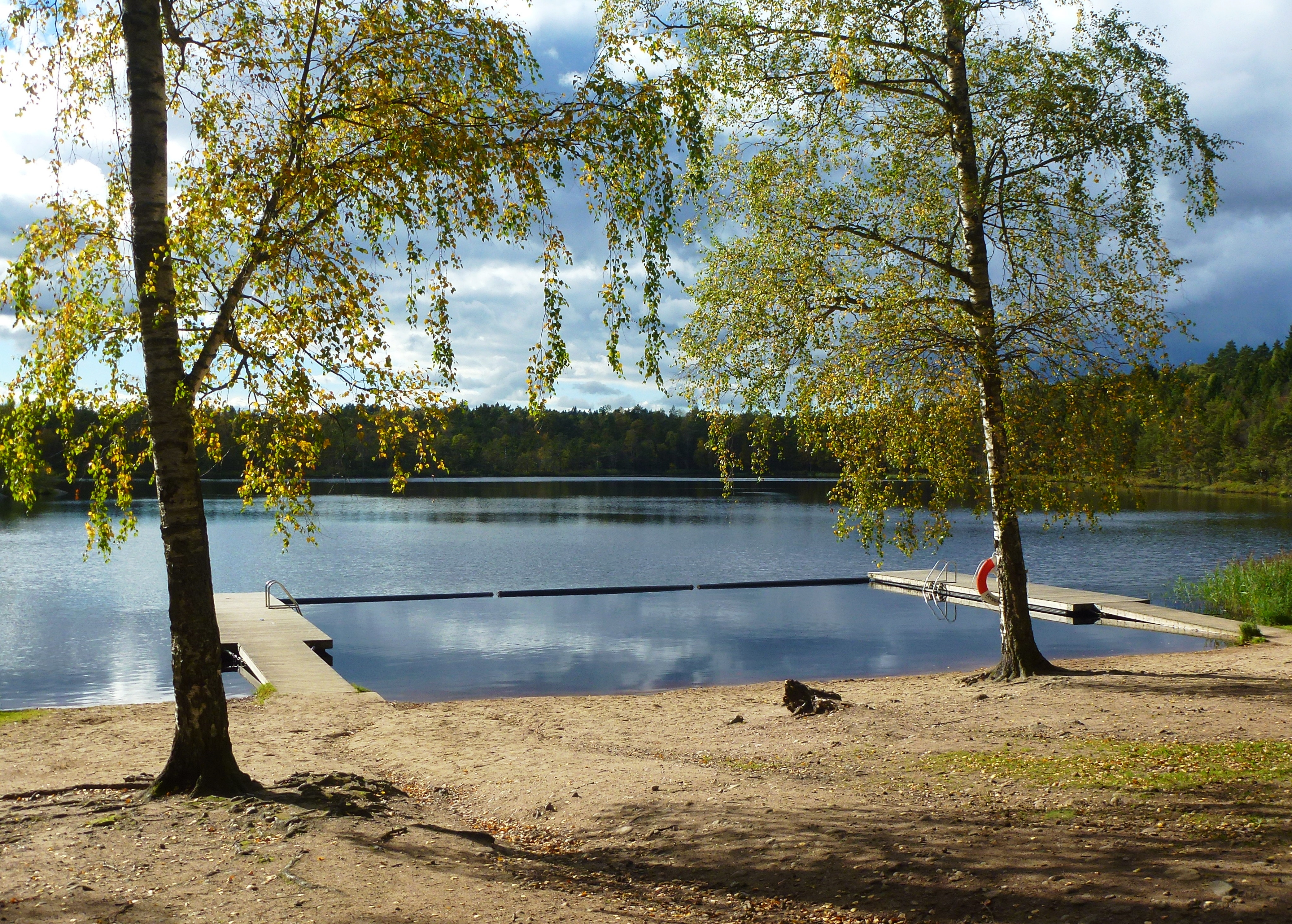 Naturreservatet "Älta mosse - Strålsjön" och "Strålsjön - Erstavik" badplatsen vid Strålsjön)